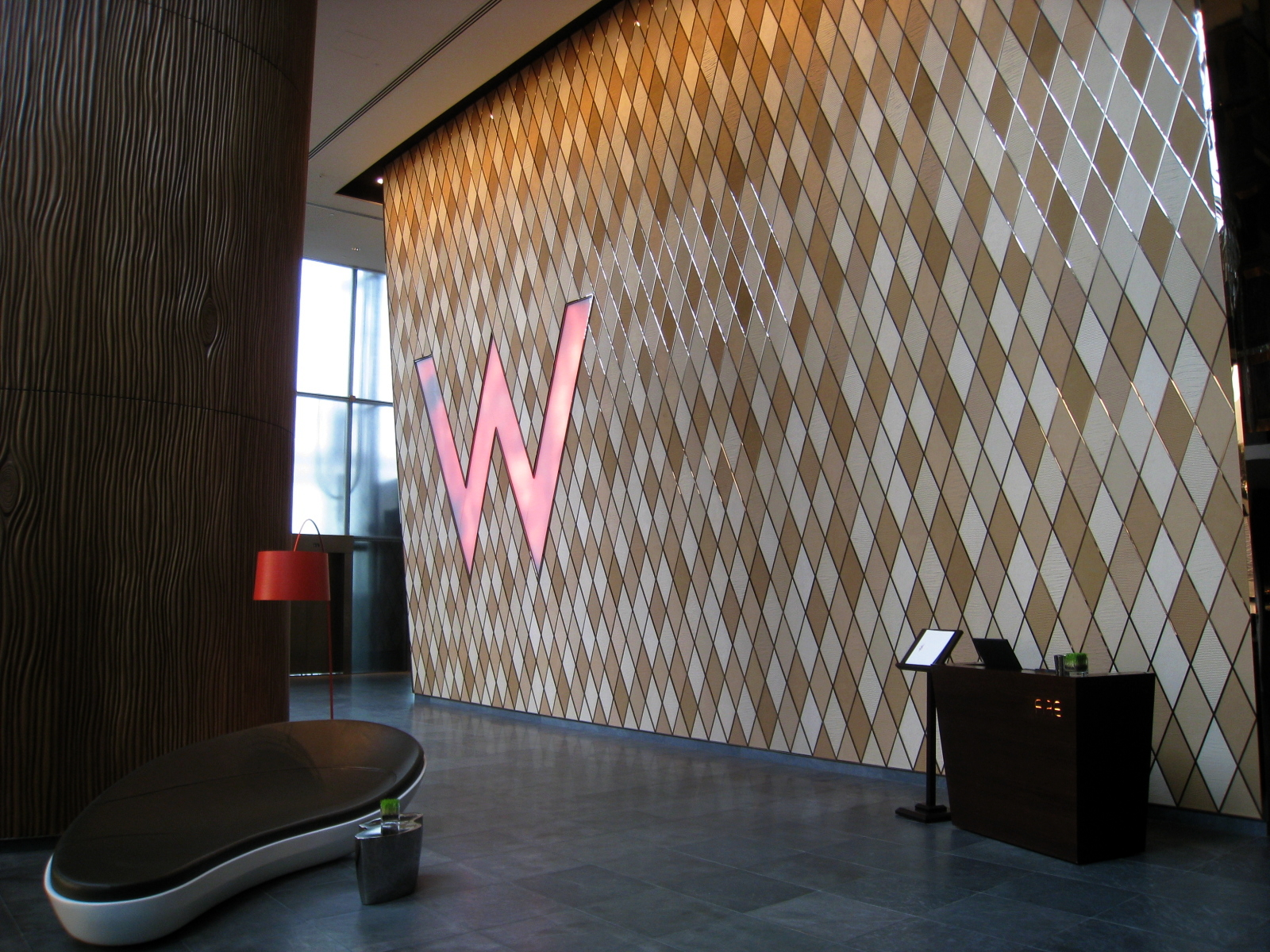 W Hotel Hong Kong 香港W酒店